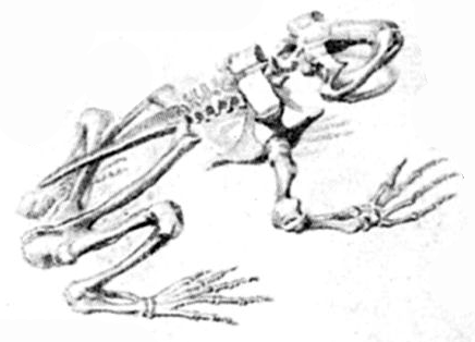 Skelett vom Frosch